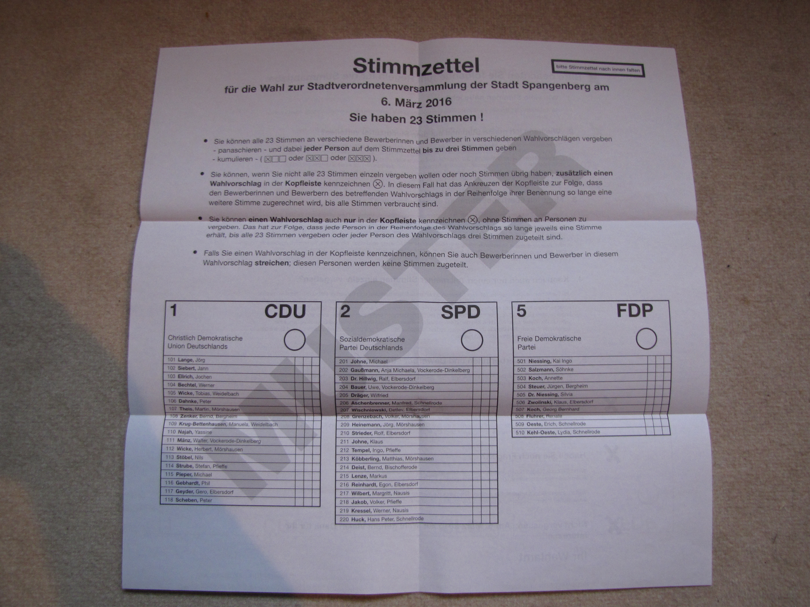 Musterstimmzettel zur Kommunalwahl 2016 in Hessen, hier: Stadtverordnetenversammlung